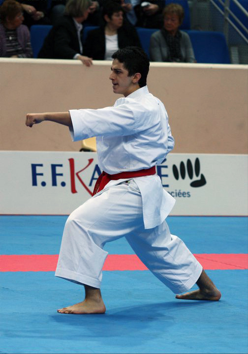 Metin Sofuoğlu Karate Oitsuki